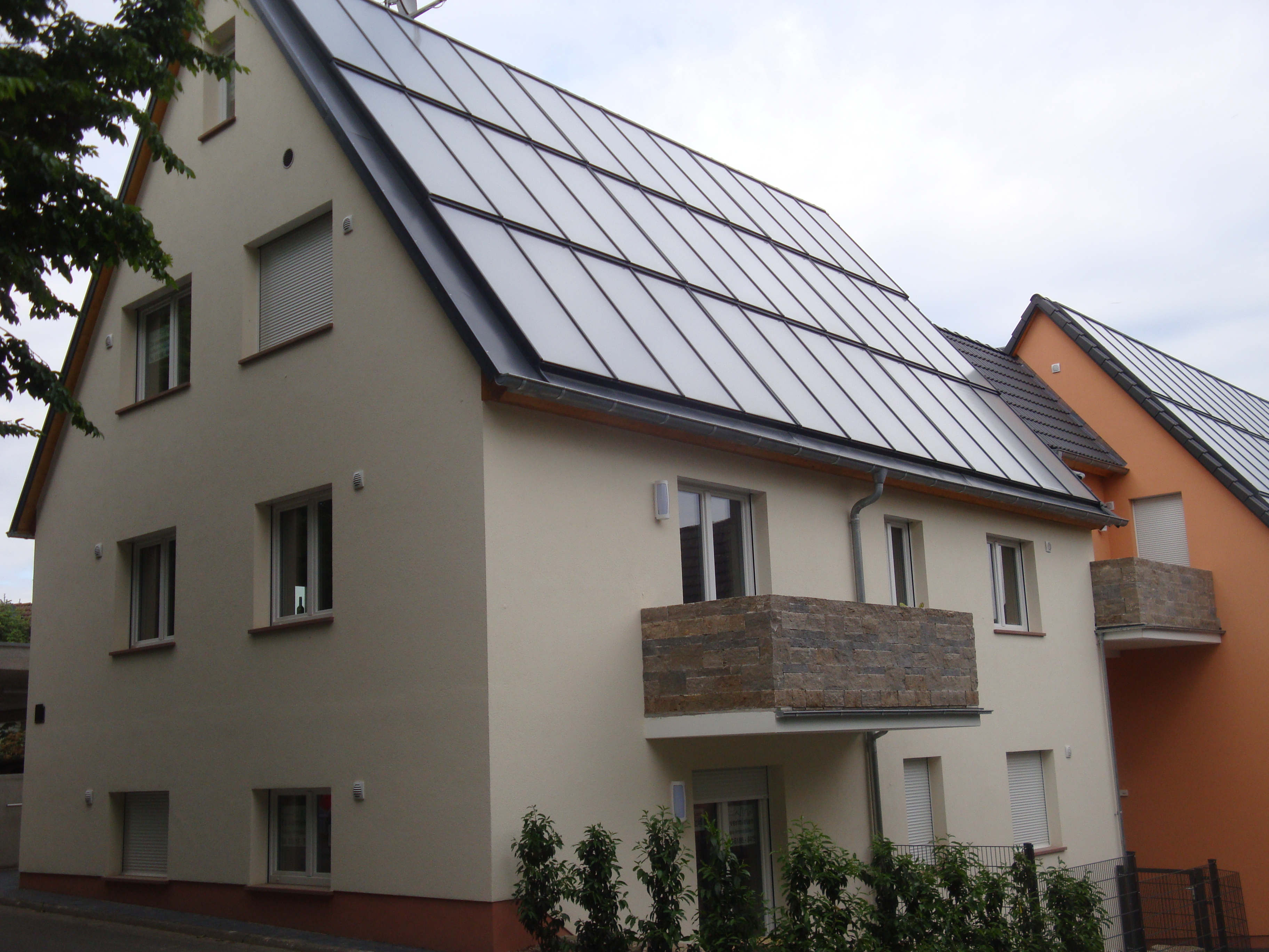 Solarhauskomplex bestehen aus 4 Neubauten und einem Altbau, 16 Wohneinheiten, Heizung mittels Solarthermie und Holz-Hackschnitzel, solarer Deckungsgrad von ca. 65 %, Speicherung mittels Solartank (66.900 Liter)